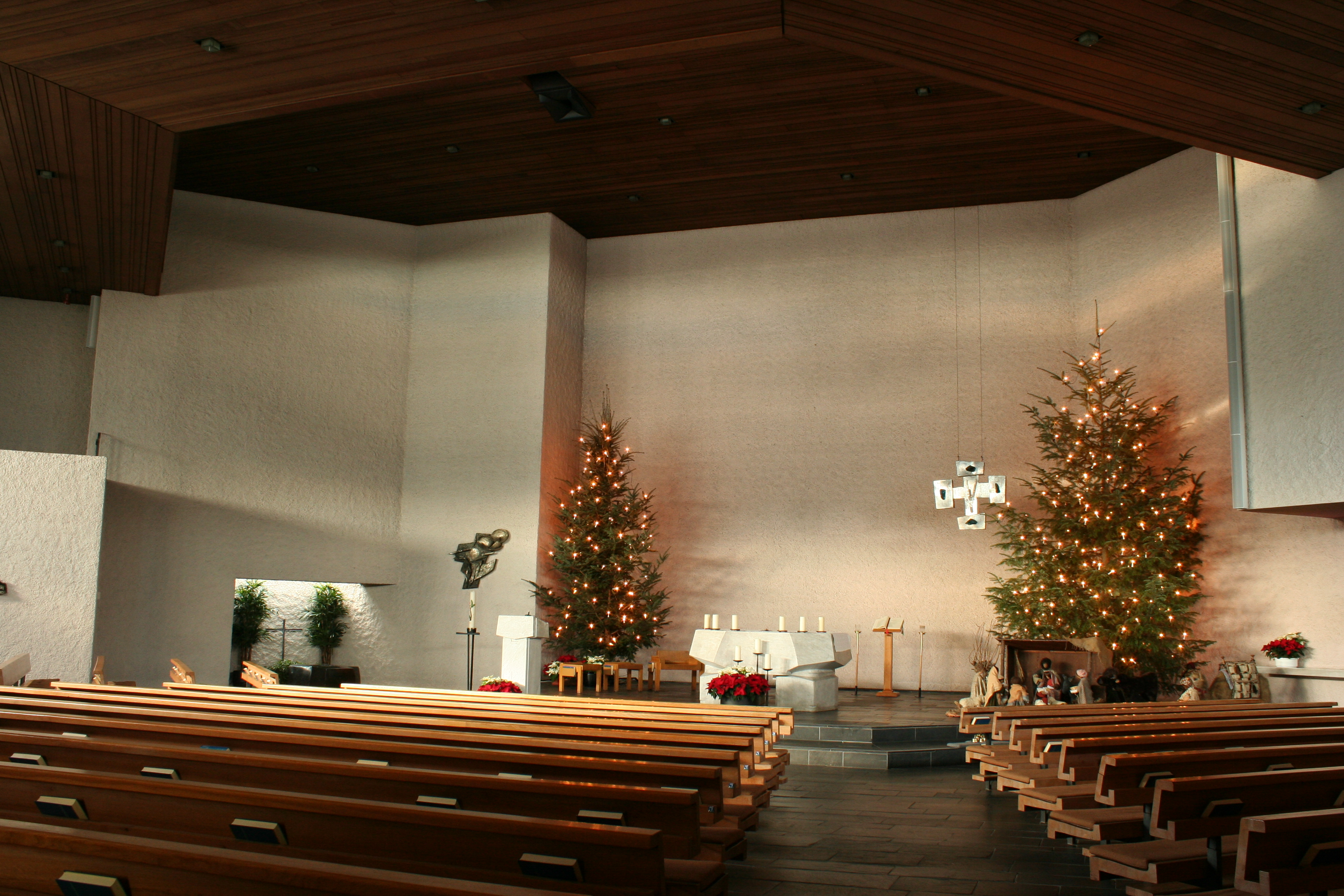 Römisch-katholische Pfarrkirche St. Michael Zollikerberg, Innenraum an Weihnachten